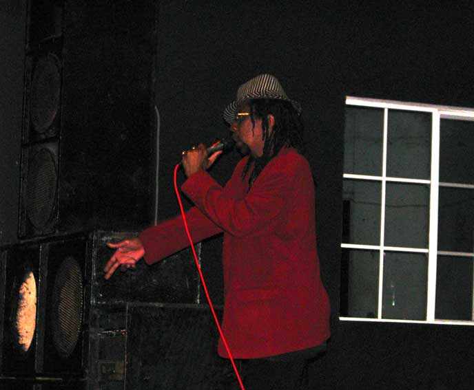 Edi Fitzroy. Negril, Jamaica. Janeiro 2011. Foto: FabDub & Dubdem.